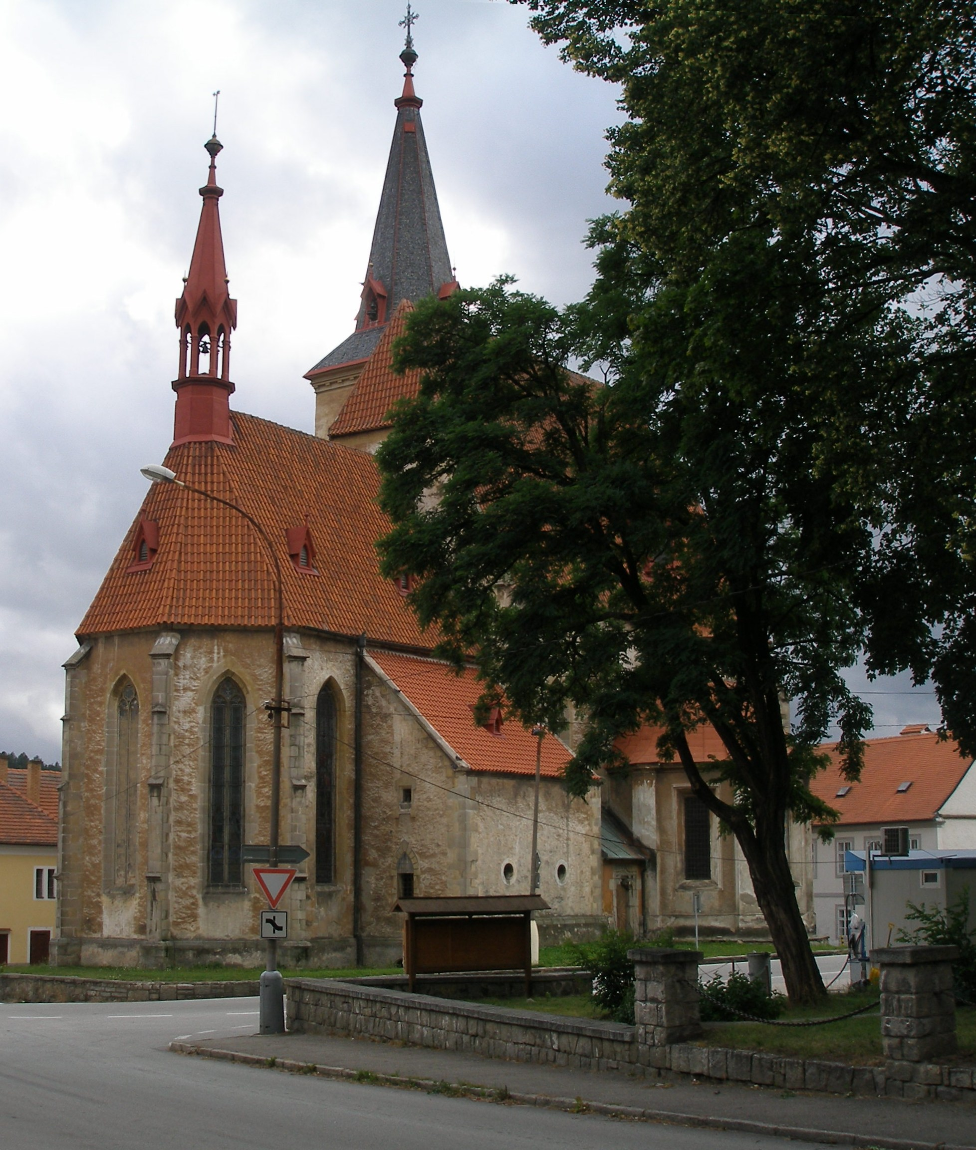 Pohled na závěr presbytáře chvalšinského kostela od severovýchodu